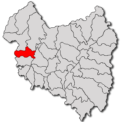 Categorie:Hărţi ale judeţului Covasna